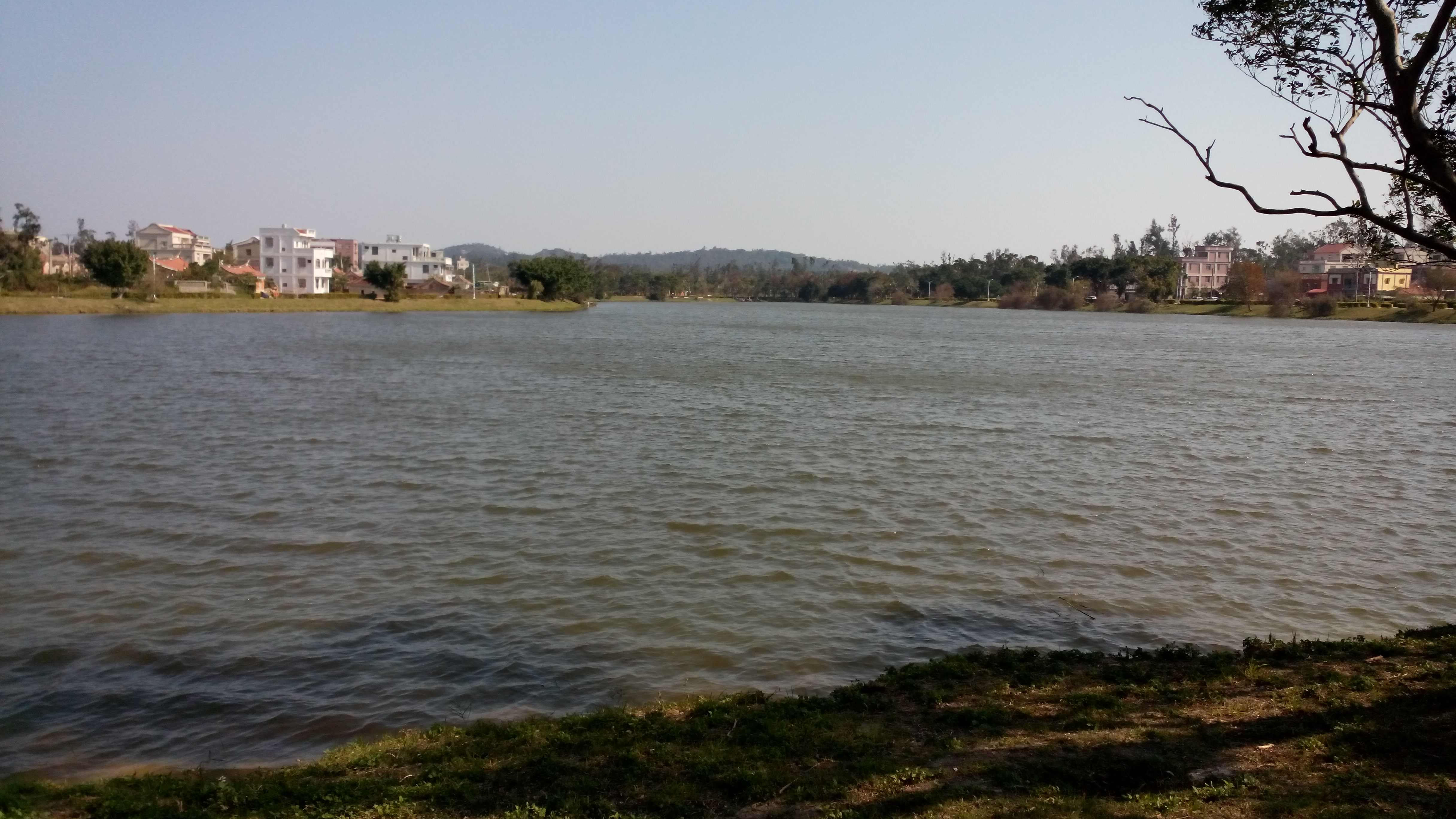 金沙鎮榮湖水庫